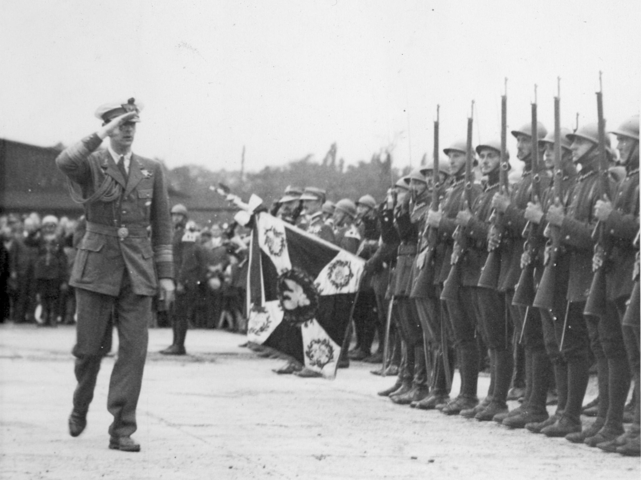 Wizyta brata króla Rumunii księcia Mikołaja w Polsce. Brat króla Rumunii książę Mikołaj przechodzi przed pocztem sztandarowym 36 Pułku Piechoty Legii Akademickiej na lotnisku na Polu Mokotowskim. Koncern Ilustrowany Kurier Codzienny - Archiwum Ilustracji. Sygnatura: 1-D-1384-3